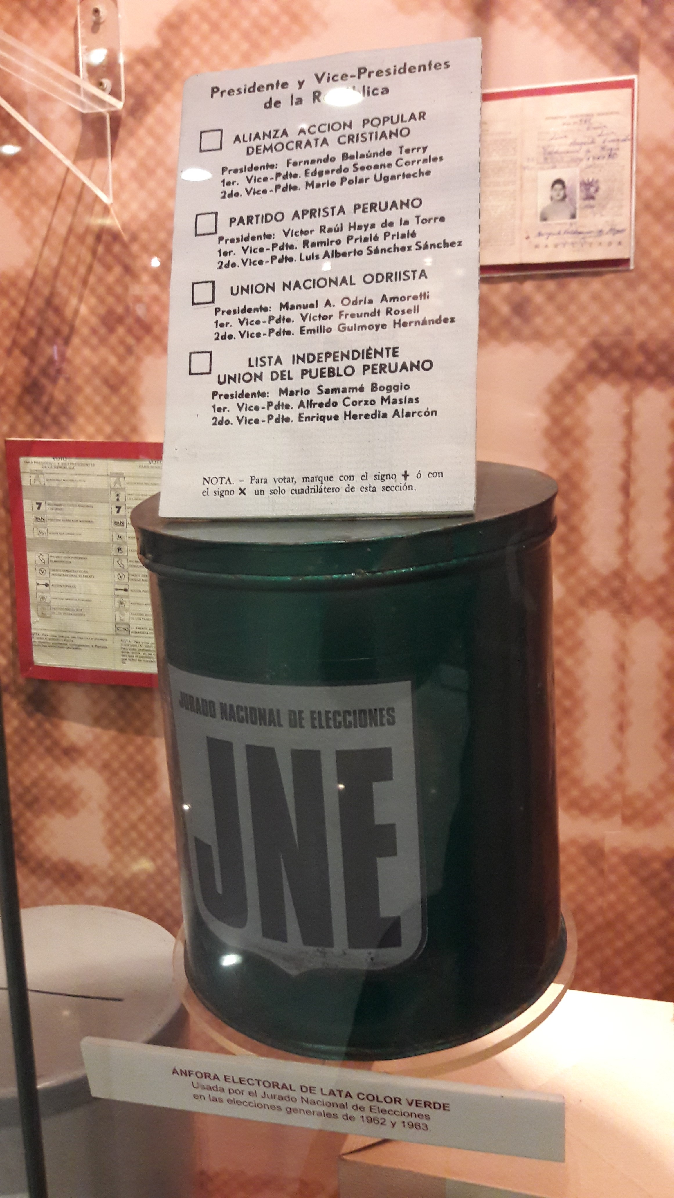 Ánfora Electoral de Lata Verde (1962.1963)